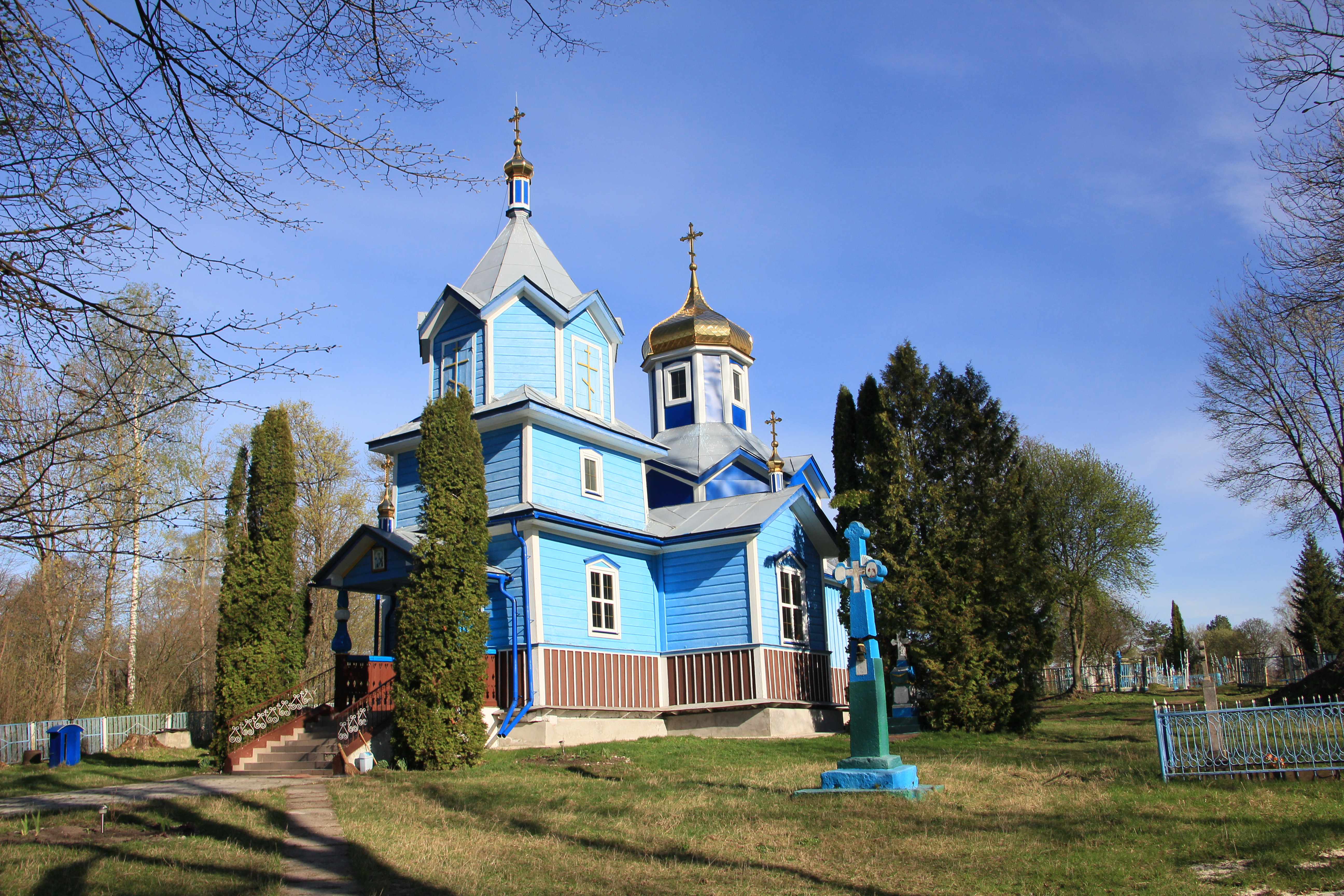 Дерев'яна церква в селі Іванківці Кременецького району Тернопільської області